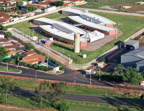 Sesi de Catanduva